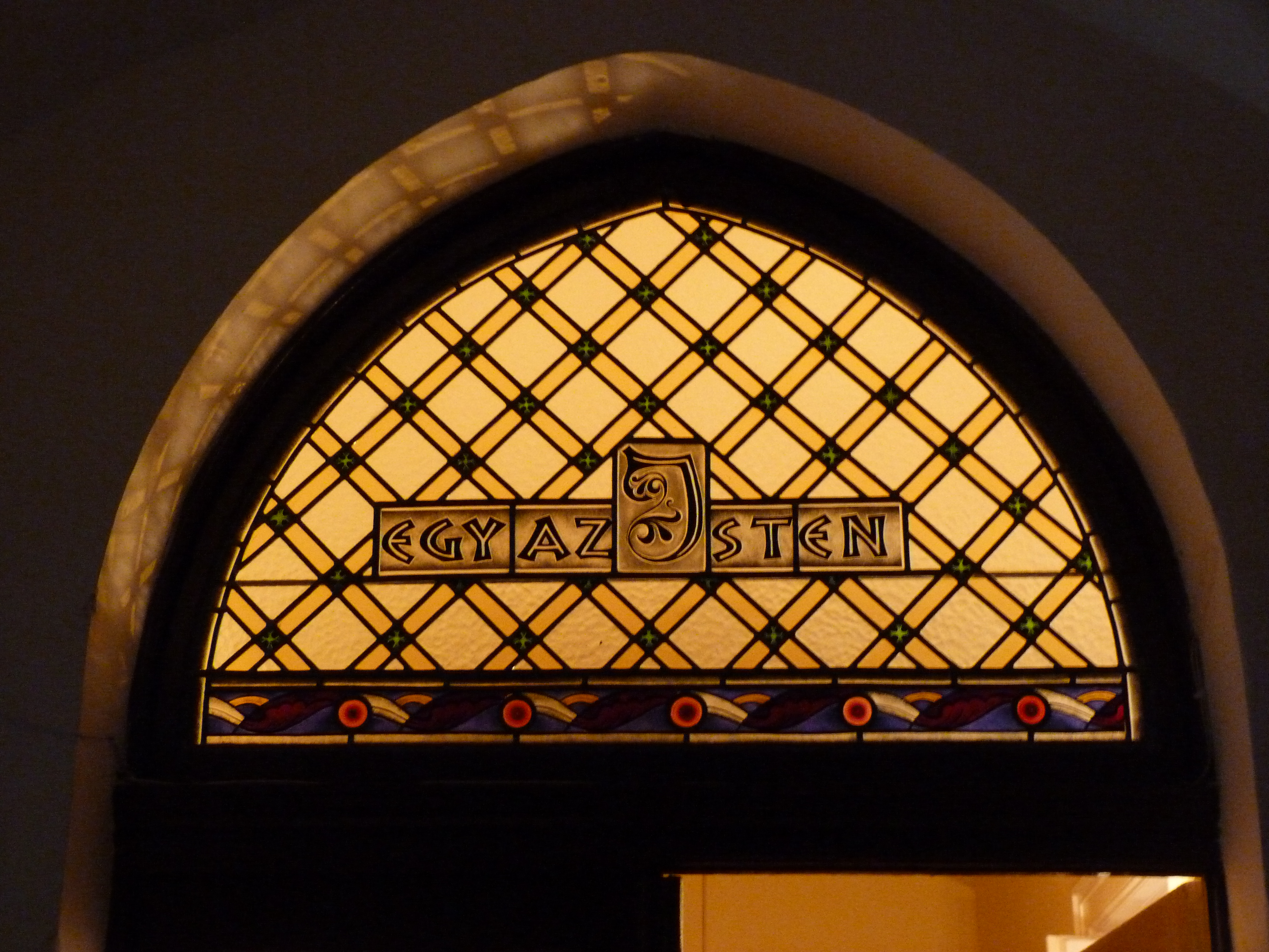 A felvétel 2014. december 14-én készült. Budapesti Unitárius Egyházközség, Belváros. Nagy Ignác utca 2-4 szám. Egy az Isten (God is the One). Felirat a Budapesti Unitárius Egyházközség Gyülekezeti Terme bejáratán. Az unitárius vallás tanítása szerint egy az Isten. (Antitrinitarizmus).